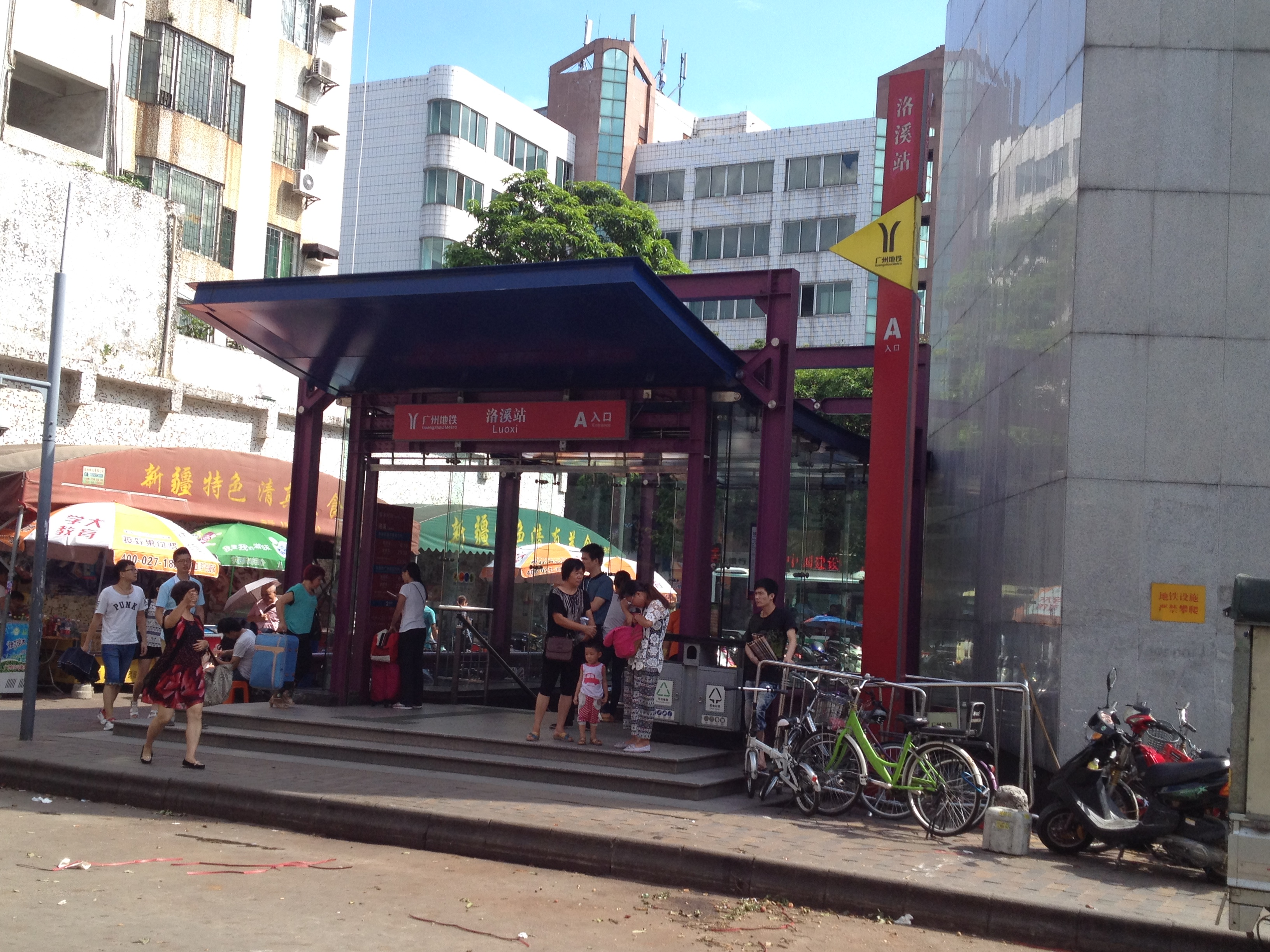 广州地铁洛溪站A出口